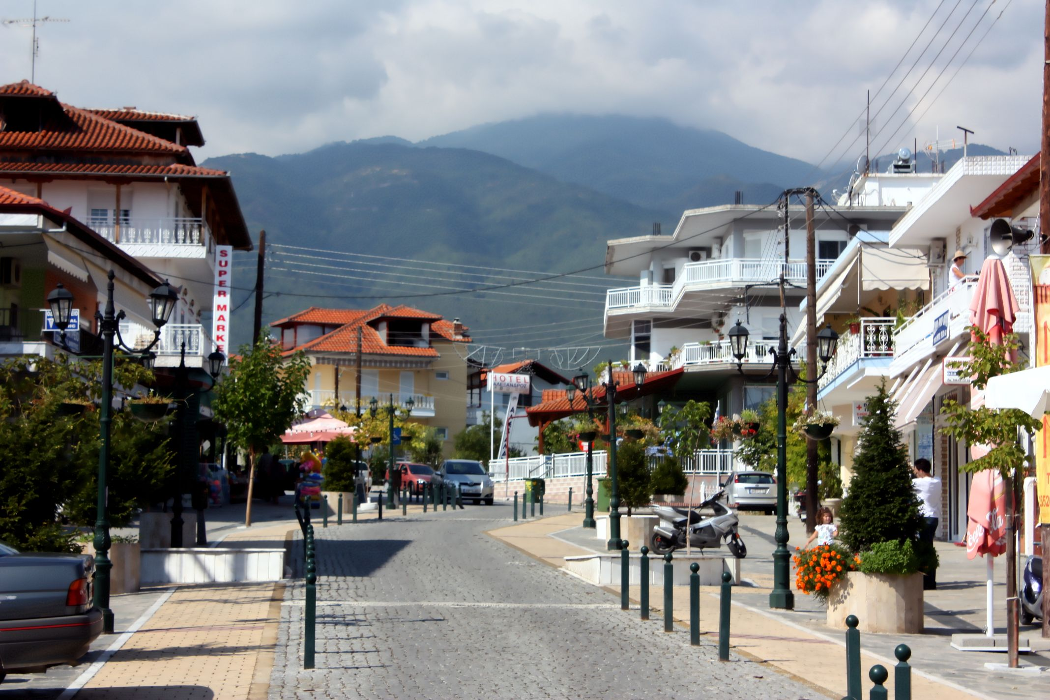 Fußgängerzone in Leptokaria